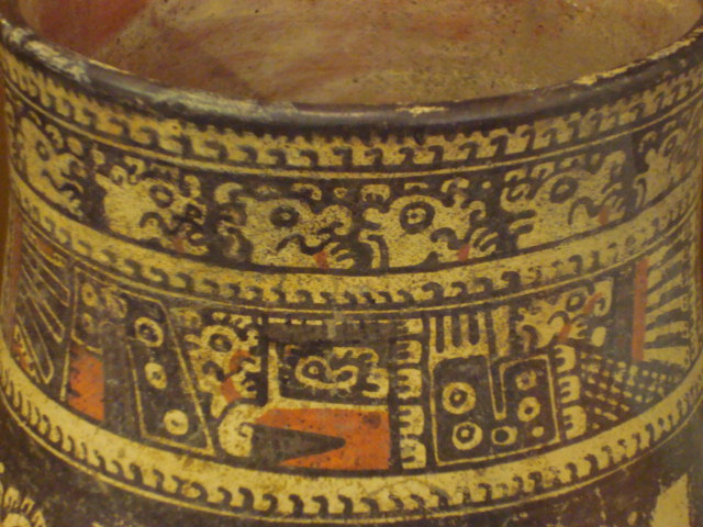 Detalle de una vasija policromada nicoyana, con motivos de jaguar y varios diseños geométricos y abstractos. Museo del Oro Precolombino, San José de Costa Rica.